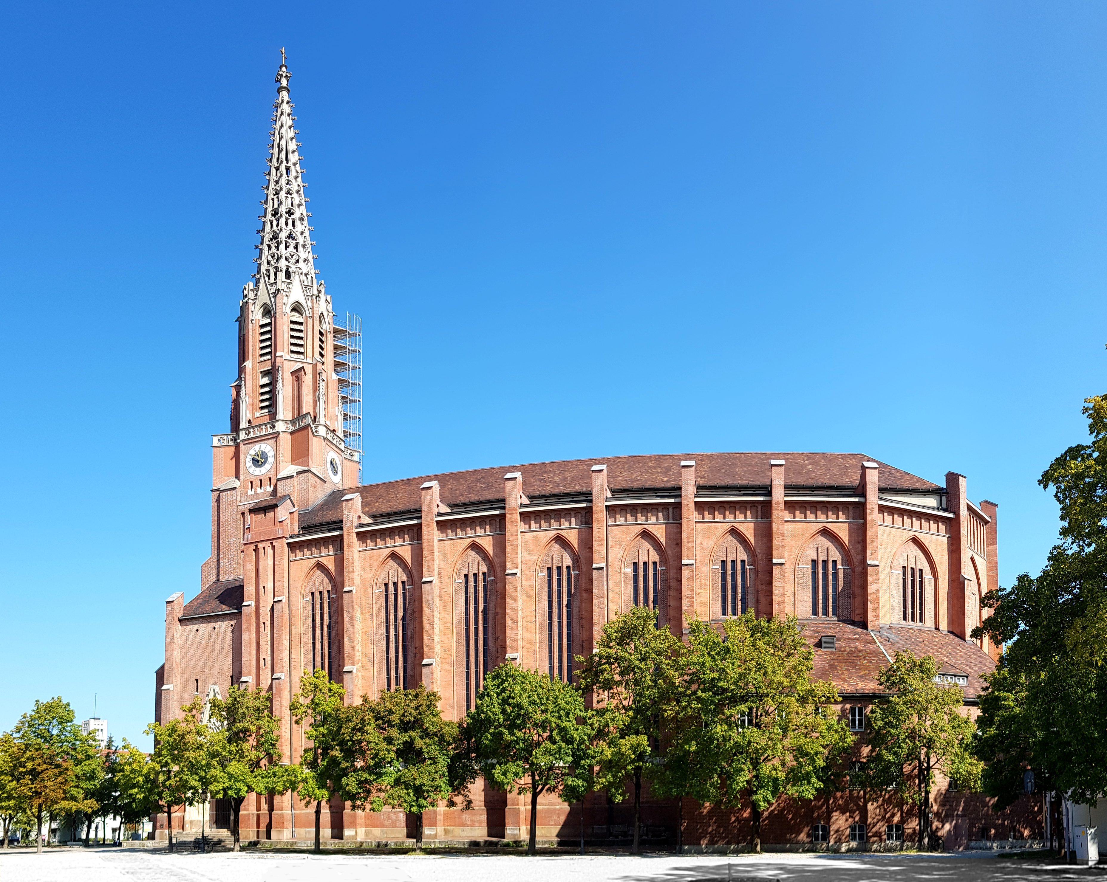 Mariahilfskirche MünchenThis is a photograph of an architectural monument.